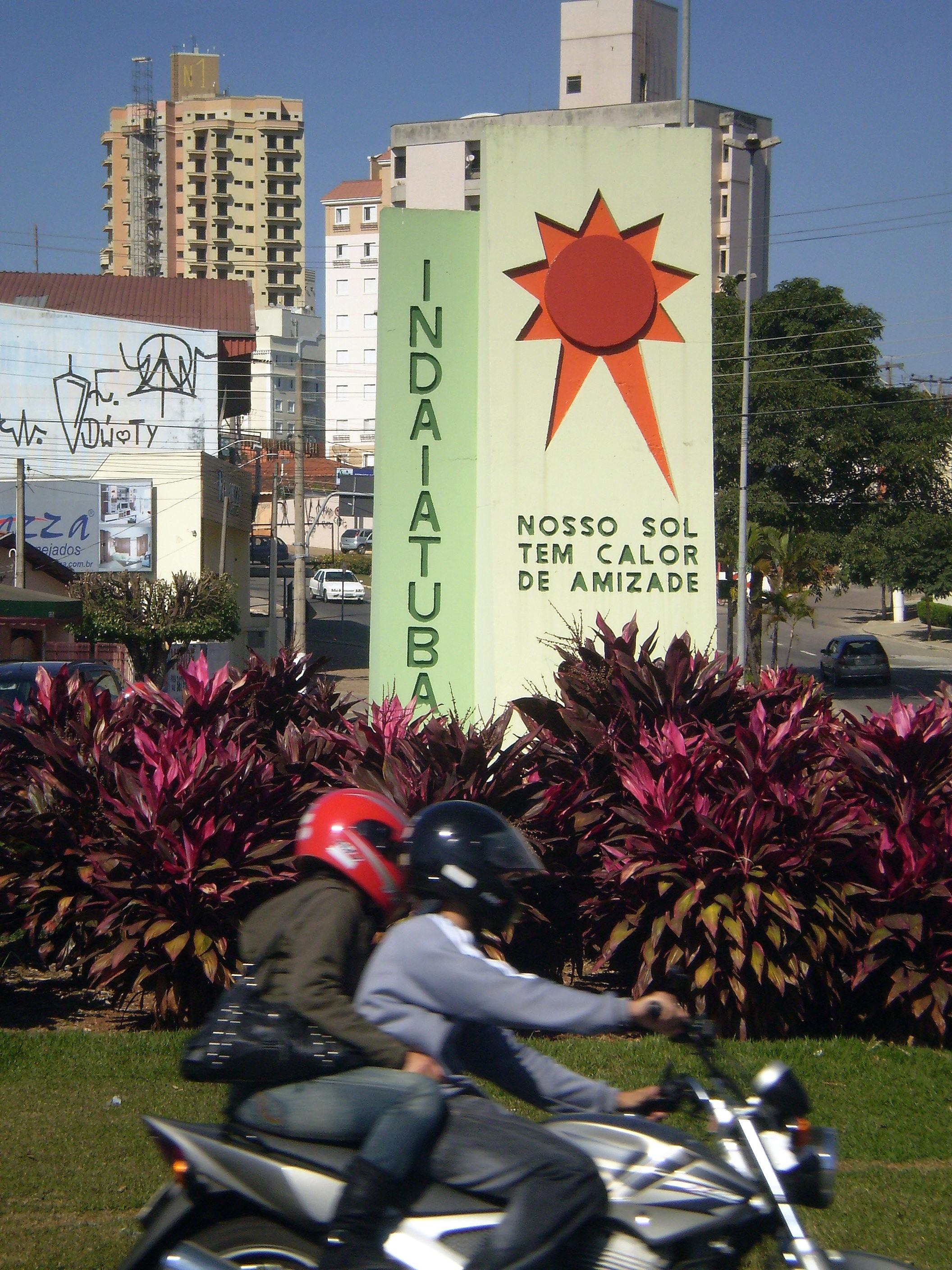 Monumento de inauguração da Avenida Conceição, Indaiatuba/SP.